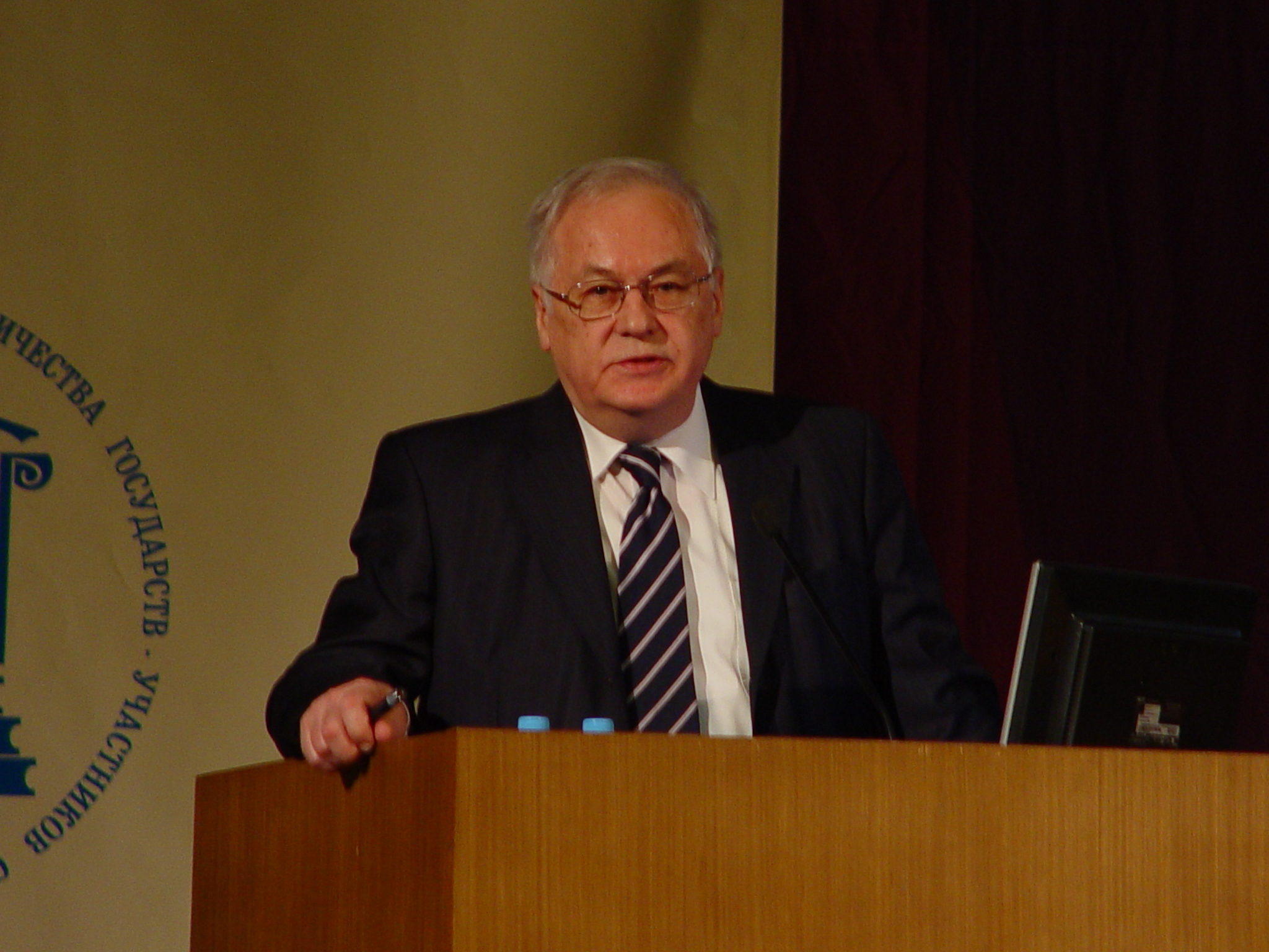 Роберт Искандерович Нигматулин, лекция в актовом зале Фундаментальной библиотеки МГУ